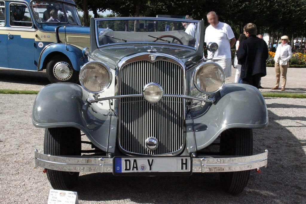 Röhr 8 Typ F Cabriolet 4-Fenster (1934) Hans Gustav Röhr gründete am 30. Oktober 1926 zusammen mit Hugo Greffenius, Hauptaktionär der MIAG, die Röhr Auto AG. Zusammen hatten beide ein Startkapital von ca. 500.000 Reichsmark. Im selben Jahr wurde das Gelände der Falcon Automobilwerke in Ober-Ramstadt übernommen. Im Herbst 1927 begann die Produktion des Röhr 8, dem der 1928 in Berlin erstmals der Öffentlichkeit vorgestellte Röhr 8 Typ R folgte. Das Fahrzeug war ein wirtschaftlicher Erfolg und man erreichte im selben Jahr einen Auftragsbestand von 2.200 Röhr-Wagen. Röhr beschäftigte 1929 etwa 800 Mitarbeiter. 1930 während der Weltwirtschaftskrise, mussten die „Röhr Auto AG“ Konkurs anmelden. Anfang 1931 stoppte die Produktion vorerst. Die Röhr Auto AG wurde mit Einverständnis der Gläubiger vom schweizerischen Röhr-Generalvertreter Joos Andreas Heintz übernommen. Unter dem Namen Neue Röhr AG wurde im April 1931 die Produktion wieder aufgenommen, Hans Gustav Röhr verließ sein Unternehmen jedoch. Im Frühjahr 1932 wurde als neues Modell der Röhr Junior vorgestellt. Die Machtergreifung der Nationalsozialisten und deren anschließende Repressalien gegenüber jüdischem Kapital schwächten die Röhr AG nachhaltig. Im Dezember 1934 musste deswegen erneut Konkurs angemeldet werden. Die Werkstätten in Ober-Ramstadt wurden im Frühjahr 1935 geschlossen. Sämtliche Fertigungsunterlagen und Werkzeuge standen zum Verkauf. Stoewer sicherte sich die Produktionsrechte am Röhr Junior und fertigte ihn als Stoewer Greif Junior bis 1939. Der Rest ging zunächst an die Gesellschaft für die Verwertung von Industrieanlagen mbH, die bis 1936 noch einige Röhr F bauen ließ. Schließlich pachtete die Noll-Monnard KG die Räume der vormaligen Reparaturabteilung und überarbeitete den Röhr F nochmals, jedoch ohne die Produktion beginnen zu können. Im Sommer 1937 wurden die Bemühungen endgültig eingestellt. Quelle